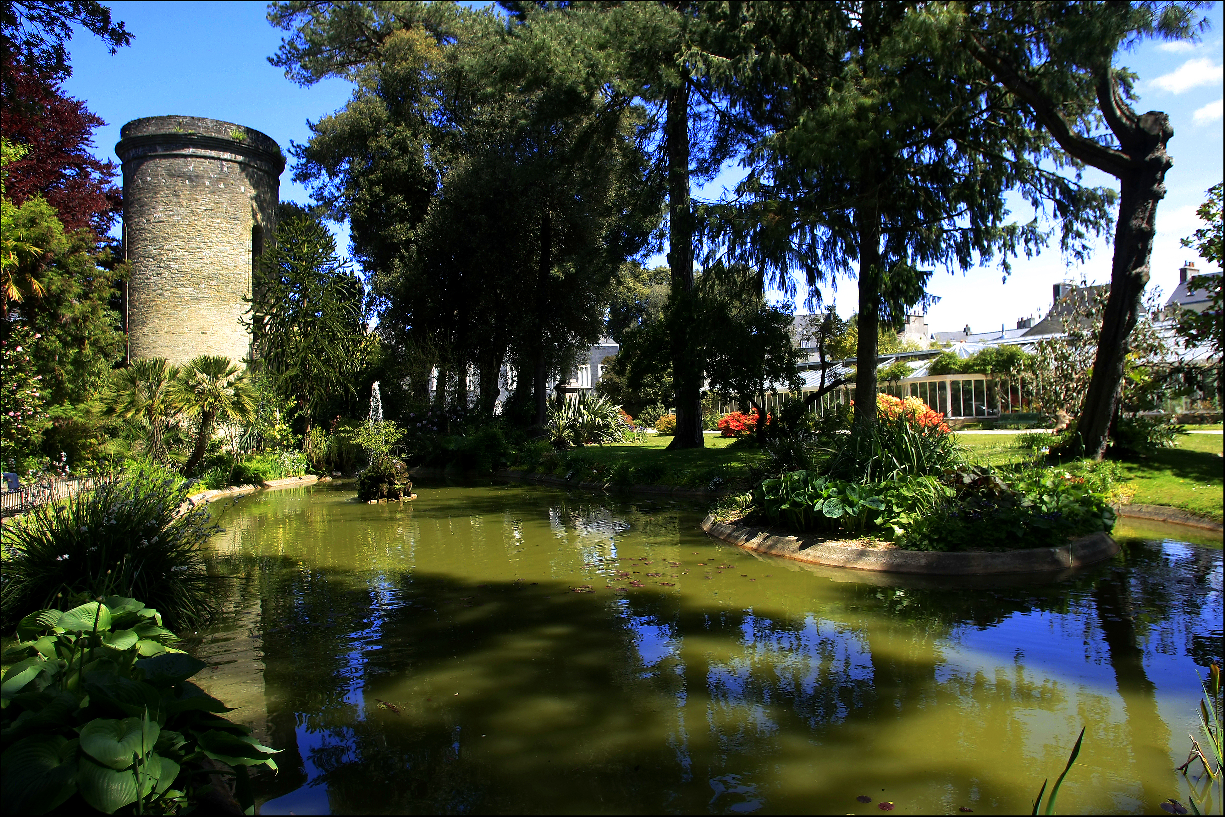 Ecrin de verdure au cœur de la ville, le Parc Emmanuel Liais, classé jardin remarquable, regroupe un patrimoine végétal surprenant et dépaysant. Vous pourrez rencontrer au hasard des allées sinueuses un Jubéa spectabilis, un palmier du Brésil, un vénérable cyprès Lambert de plus de cent ans, des plantes et arbres exotiques ramenés d’Amérique du Sud par Emmanuel Liais lors ses voyages ou importés d’Asie au XIXe. Dans les serres, vous plongerez au cœur d’une forêt tropicale humide, traverserez un désert de cactus pour atteindre une serre tropicale tempérée. Emmenez vos enfants à la découverte de plantes mystérieuses comme cet arbre au tronc comestible pouvant vivre jusqu’à 1000 ans. Le parc héberge également le muséum Emmanuel-Liais, un cabinet de curiosités avec des collections étonnantes d’animaux et d’objets. Entrée libre.